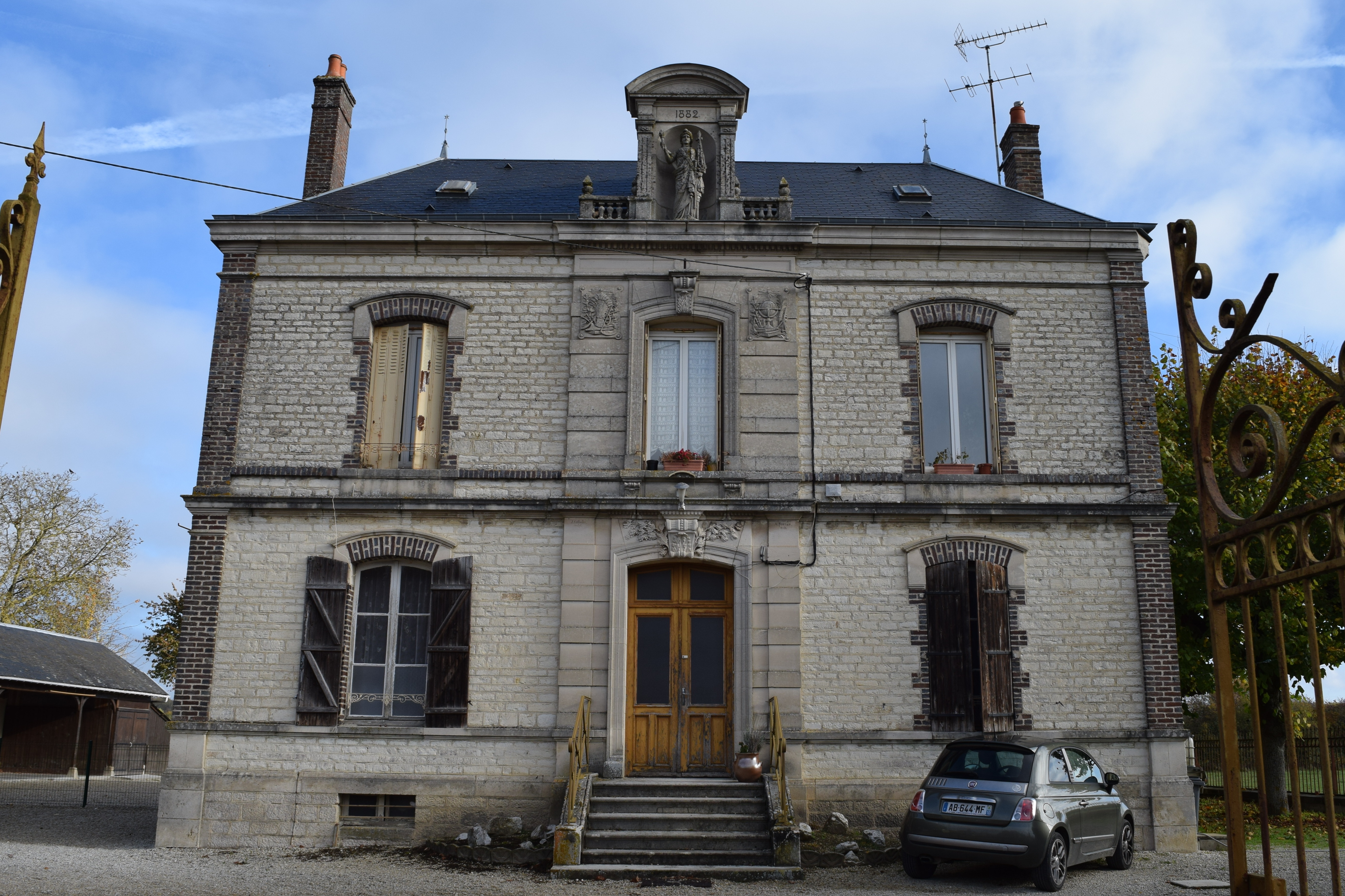 École primaire de Rouilly-Saint-Loup